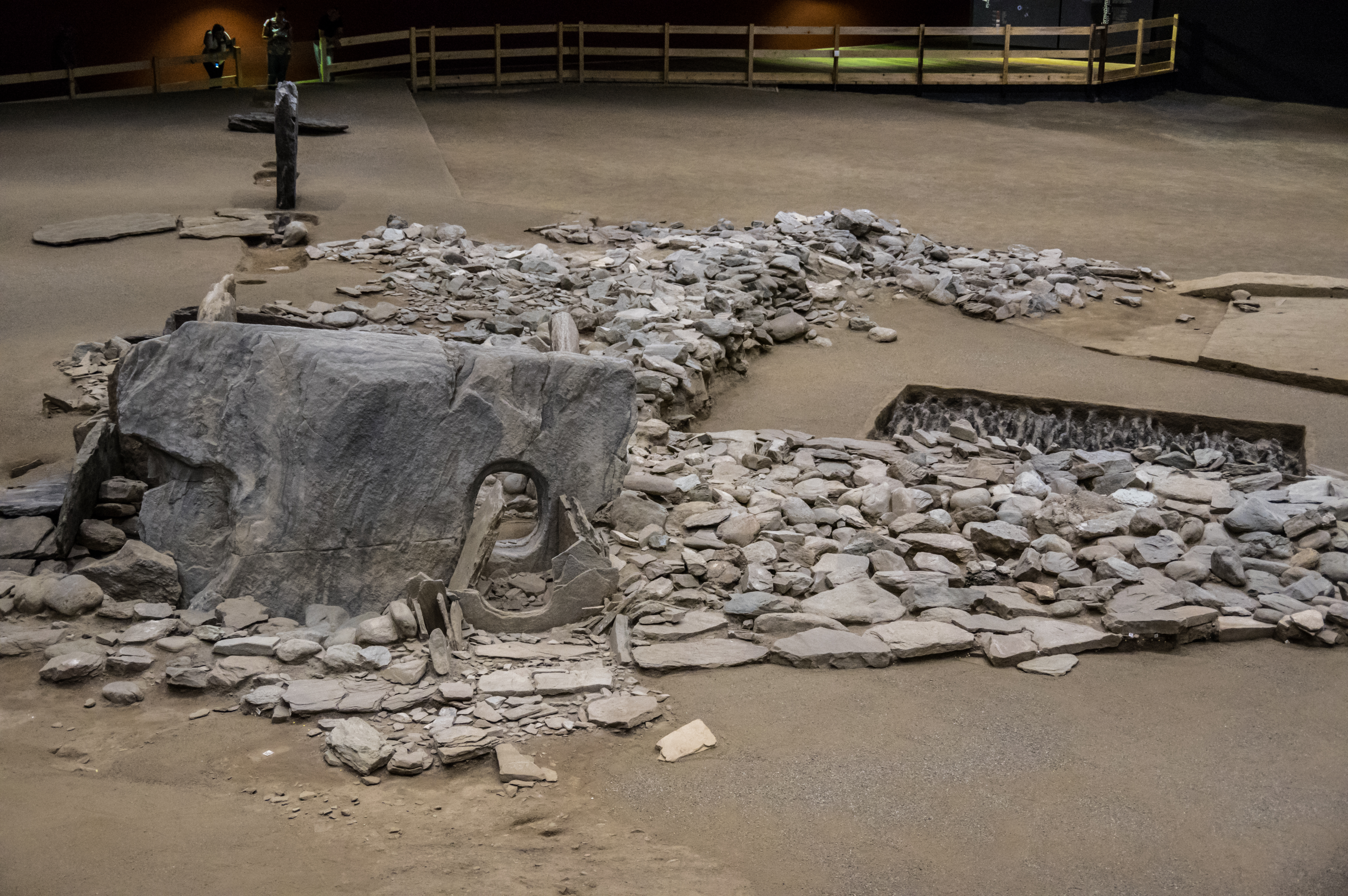 Saint-Martin-de-Corléans_27082016-027